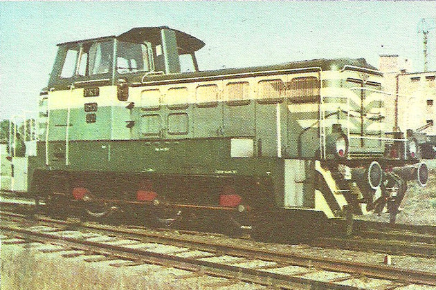 Spalinowa lokomotywa manewrowa SM31-001 wyprodukowana w 1966 przez Fabrykę Lokomotyw z Chrzanowa dla Polskich Kolei Państwowych. Prawdopodobnie fotografia fabryczna.